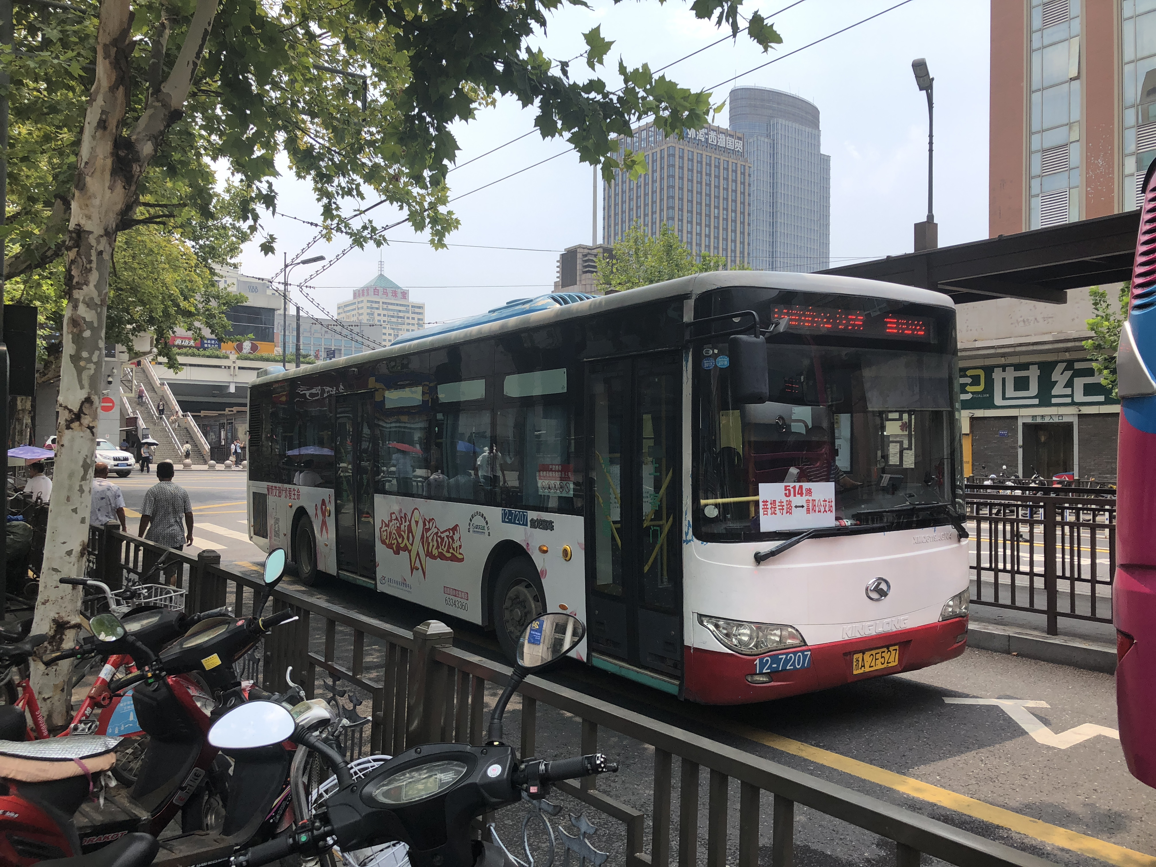 中文（中国大陆）: 杭州514